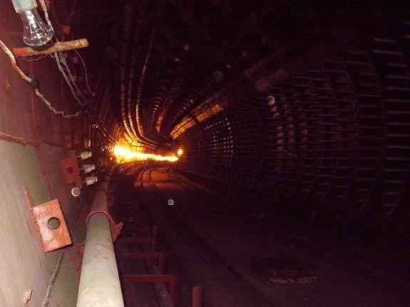 Походной тоннель между шахтой № 6Р ОАО «Трансинжстрой» и подземным комплексом в Раменках с узкоколейными рельсами